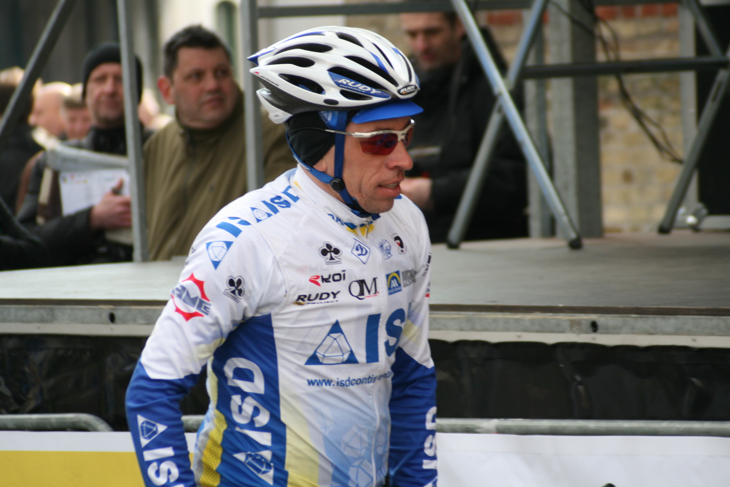 Volodymyr Rybin lors des Trois jours de Flandre occidentale 2010